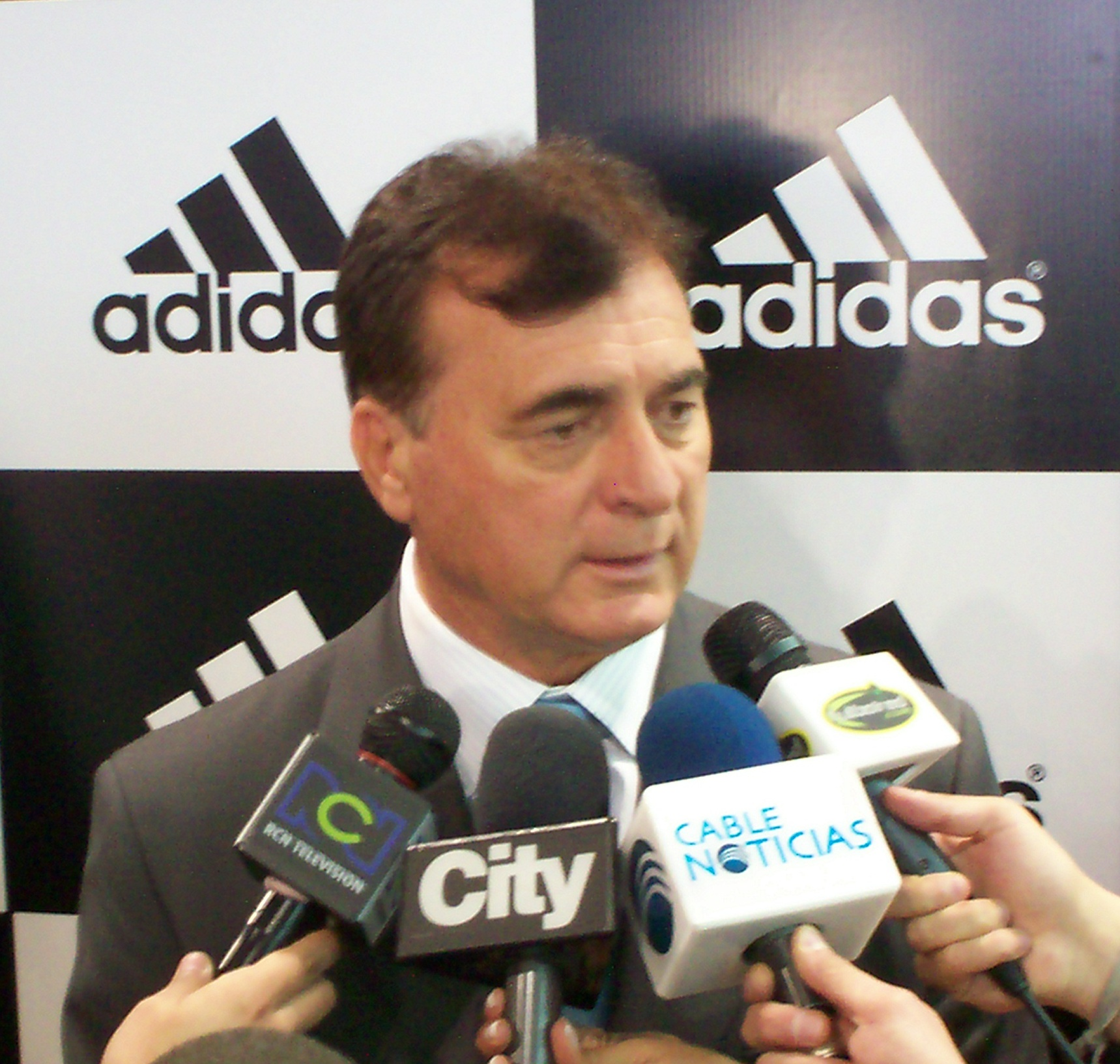 Oscar Hector Quintabani durante una rueda de prensa en Bogotá.